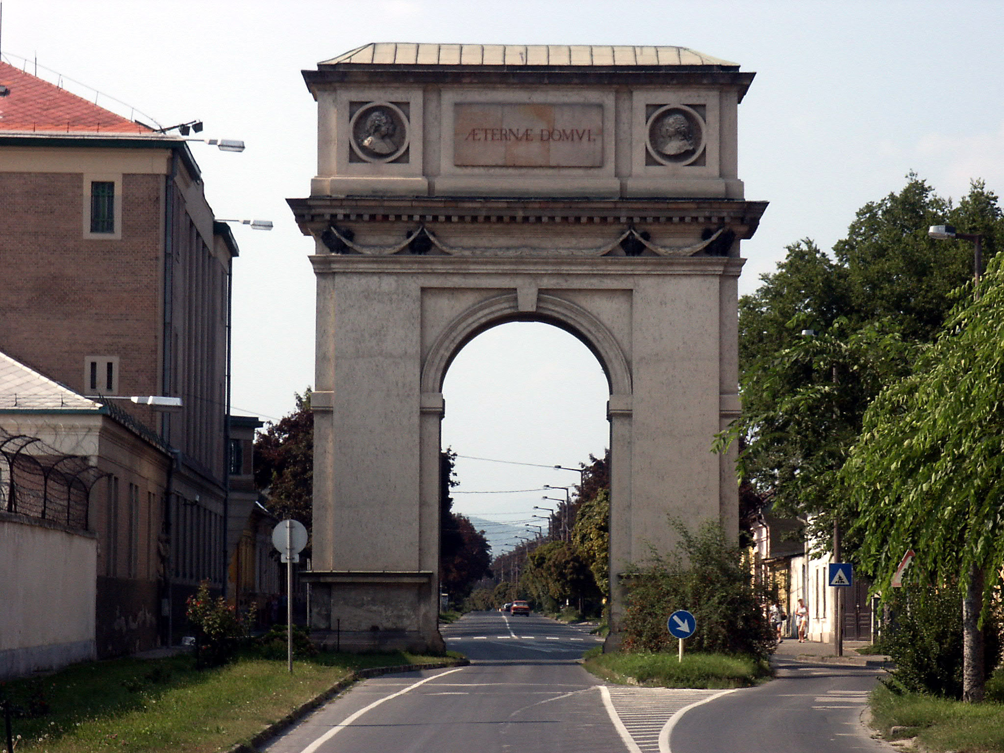 A helyiek által gyakran csak "Kőkapu" néven emlegetett, Mária Terézia tiszteletére emelt Diadalív. This is a photo of a monument in Hungary, Identifier: 7526